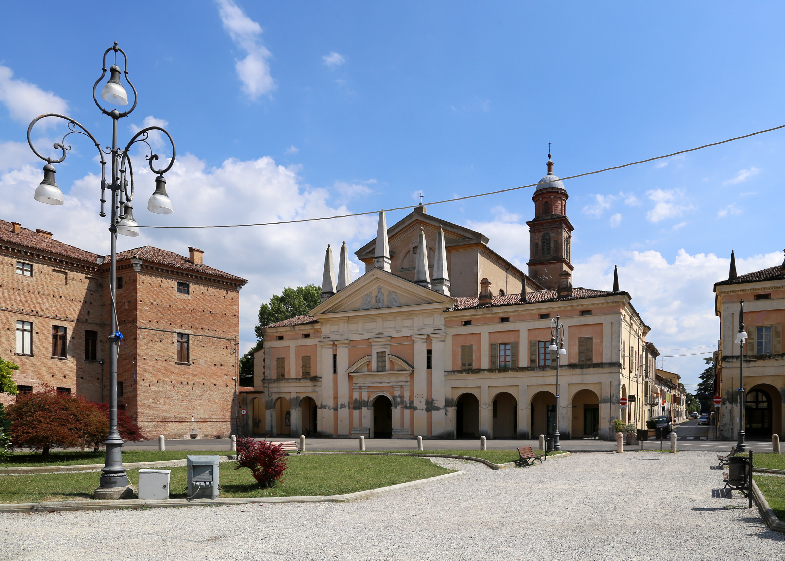 piazza Bentivoglio This is a photo of a monument which is part of cultural heritage of Italy.